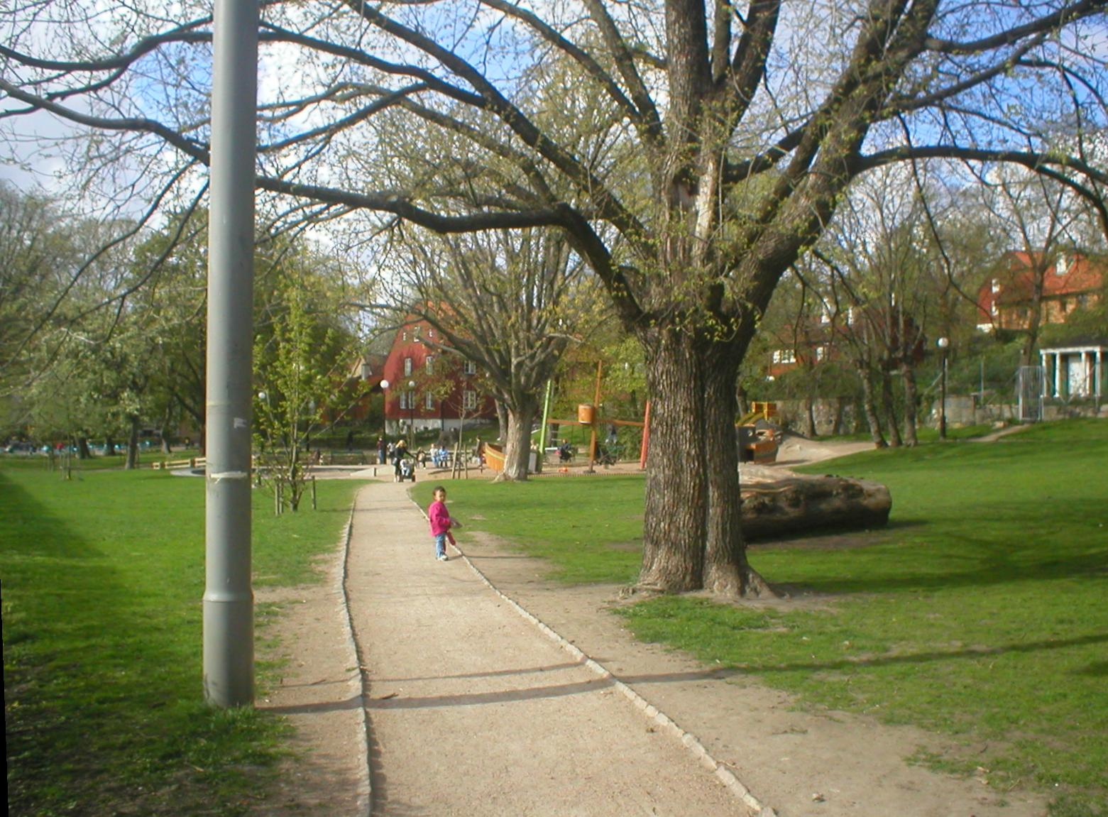 Foto av Söderlingska Trädgården, Majorna, Göteborg. Taget av Per Johansson 2005.